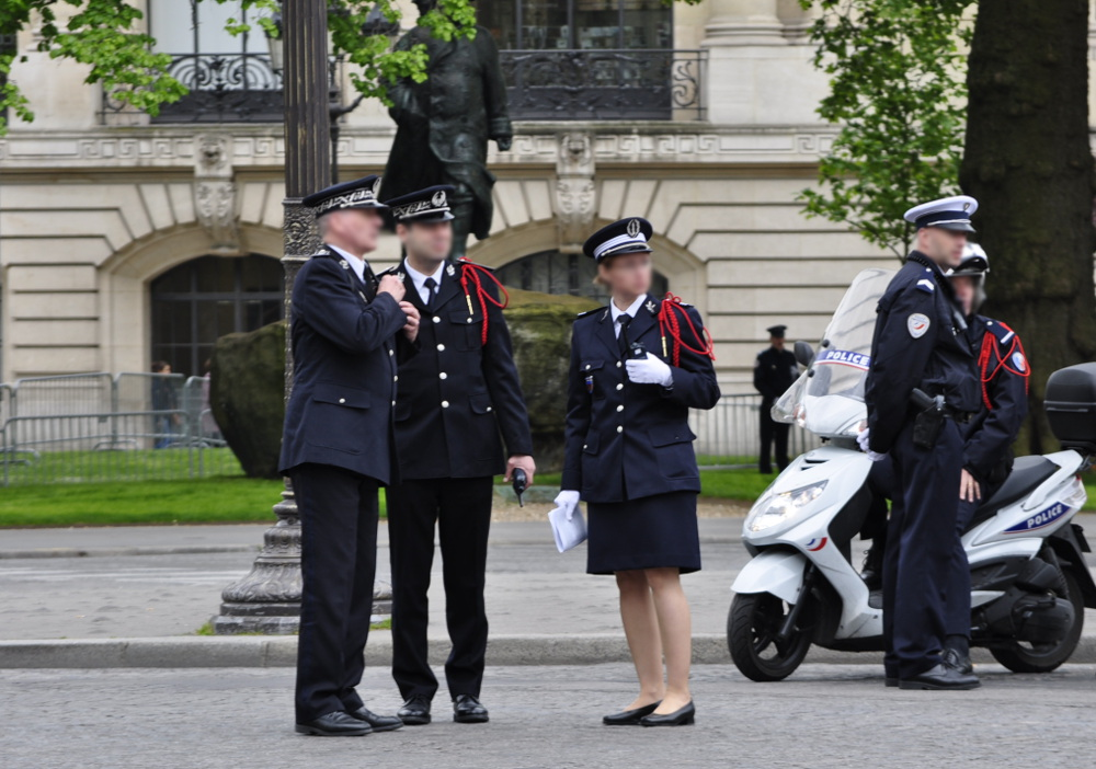 Des agents de la préfecture de police de Paris en tenue de cérémonie surveillent la cérémonie du jour de la Victoire en Europe le 8 mai 2015 à Paris. de gauche à droite : deux commissaires, une capitaine, un gardien de la paix et un brigadier-chef. Les officiers en tenue de cérémonie portent la fourragère rouge de la préfecture de police de Paris. La photo est prise place Clemenceau, la statue de Georges Clemenceau est visible en arrière plan. Le visage des policiers a été flouté lors de la retouche.